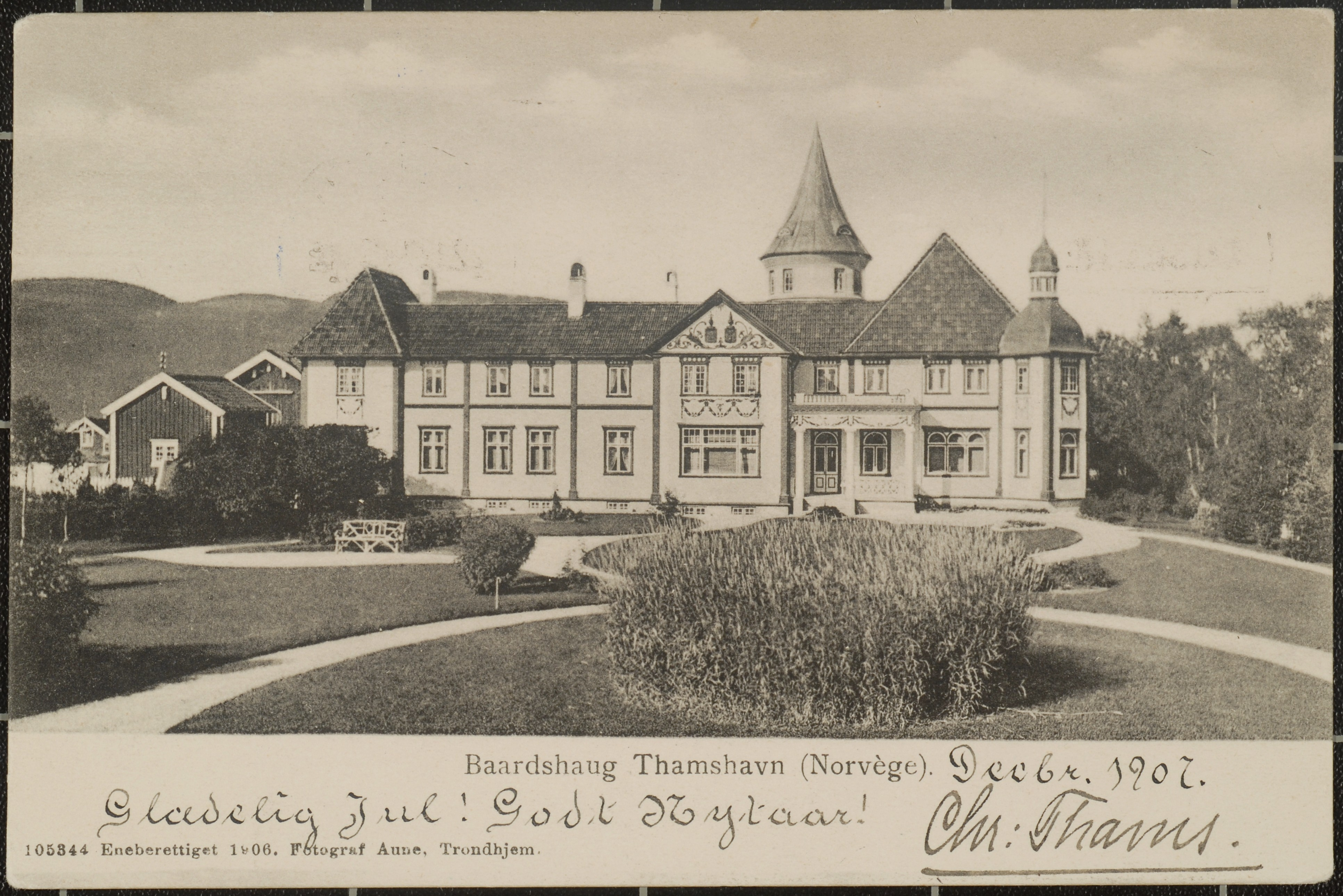 Chr. Thams sitt anlegg, Bårdshaug gård med hage, på Øvre Rømme i Orkdal.